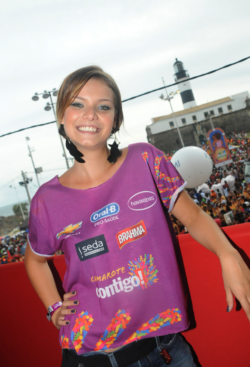 Atriz Milena Toscano no carnaval da Bahia em 2012